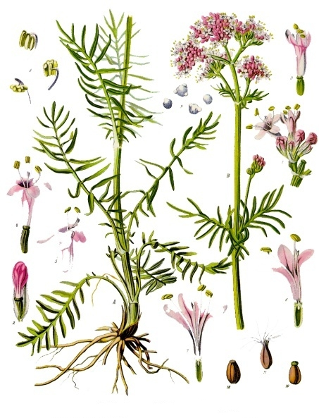 Baldrian. A B Pflanze der schmalblätterigen Form in natürl. Grösse; 1 Blüthenästchen, vergrössert; 2 Blüthenknospe mit Deckblättchen, desgl.; 3, 4, 5 Blüthen, desgl.; 6 u. 7 dieselben im Längsschnitt, von verschiedenen Seiten, desgl.; 8 Staubgefässe, desgl.; 9 Pollen unter Wasser, desgl.; 10 junge Frucht ohne Federkrone, desgl.; 11 dieselbe mit Federkrone, desgl.; 12 Same, desgl.